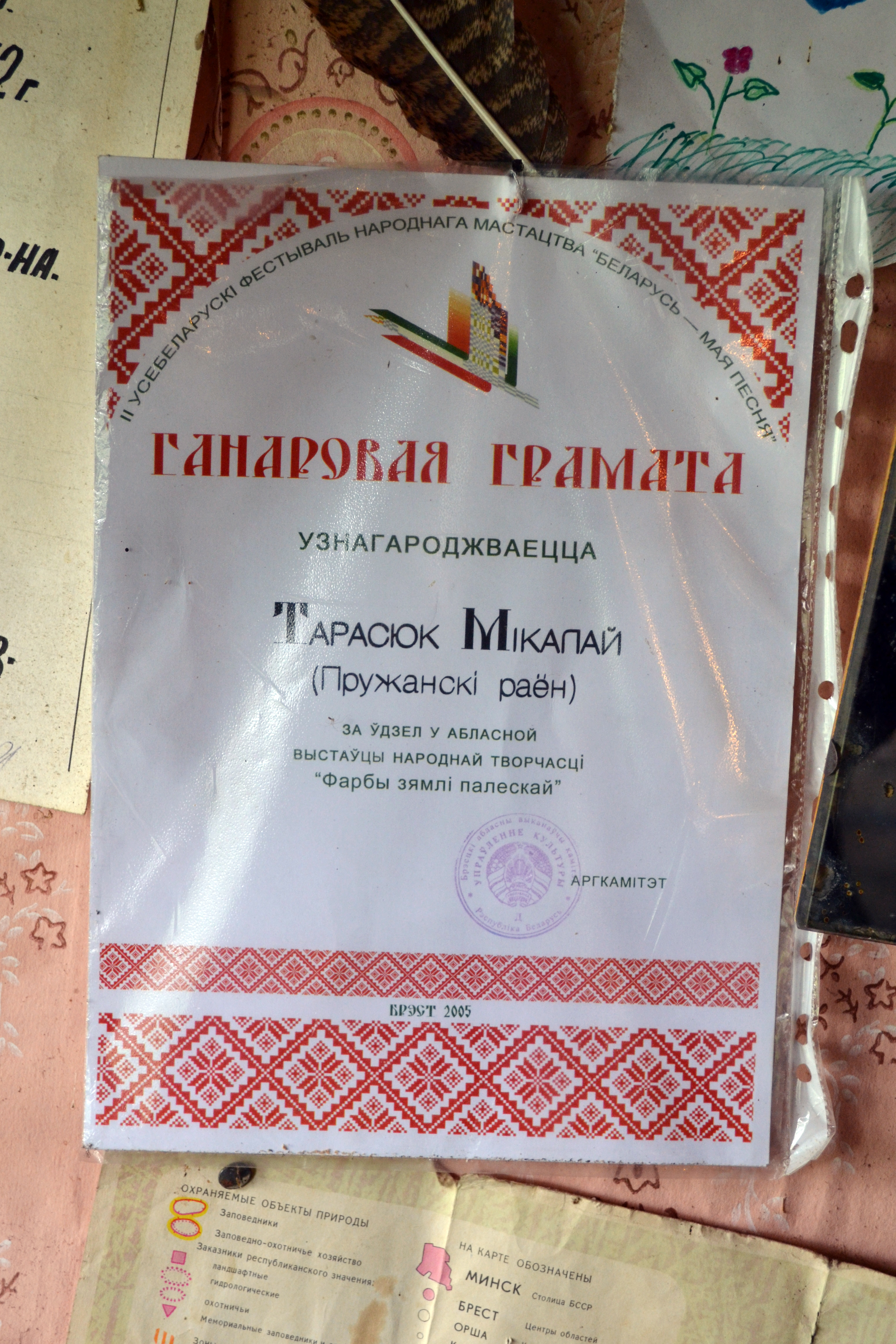 Беларуская (тарашкевіца): Ганаровая грамата Мікалаю Тарасюку